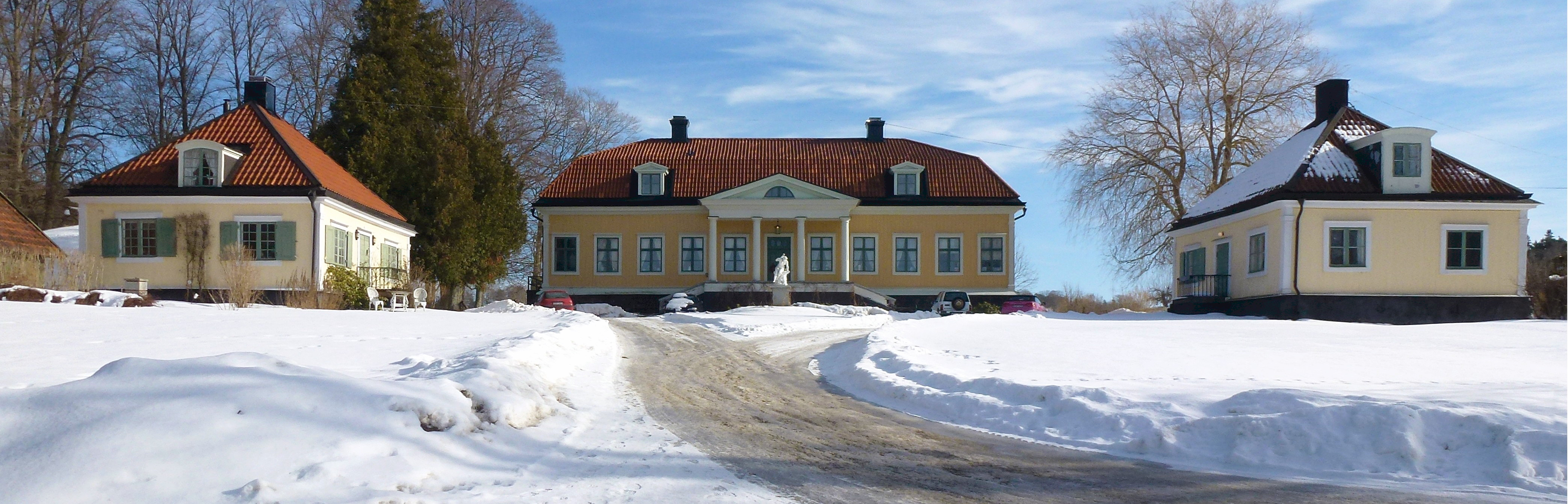 Norsborgs herrgård med flyglar